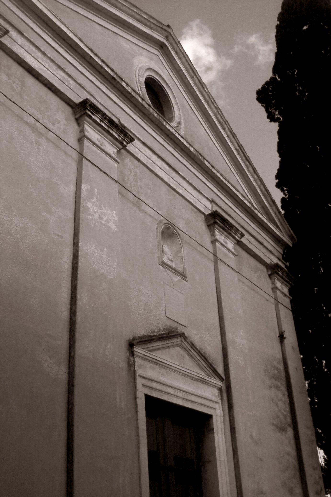 Foto di Paolo Steffan